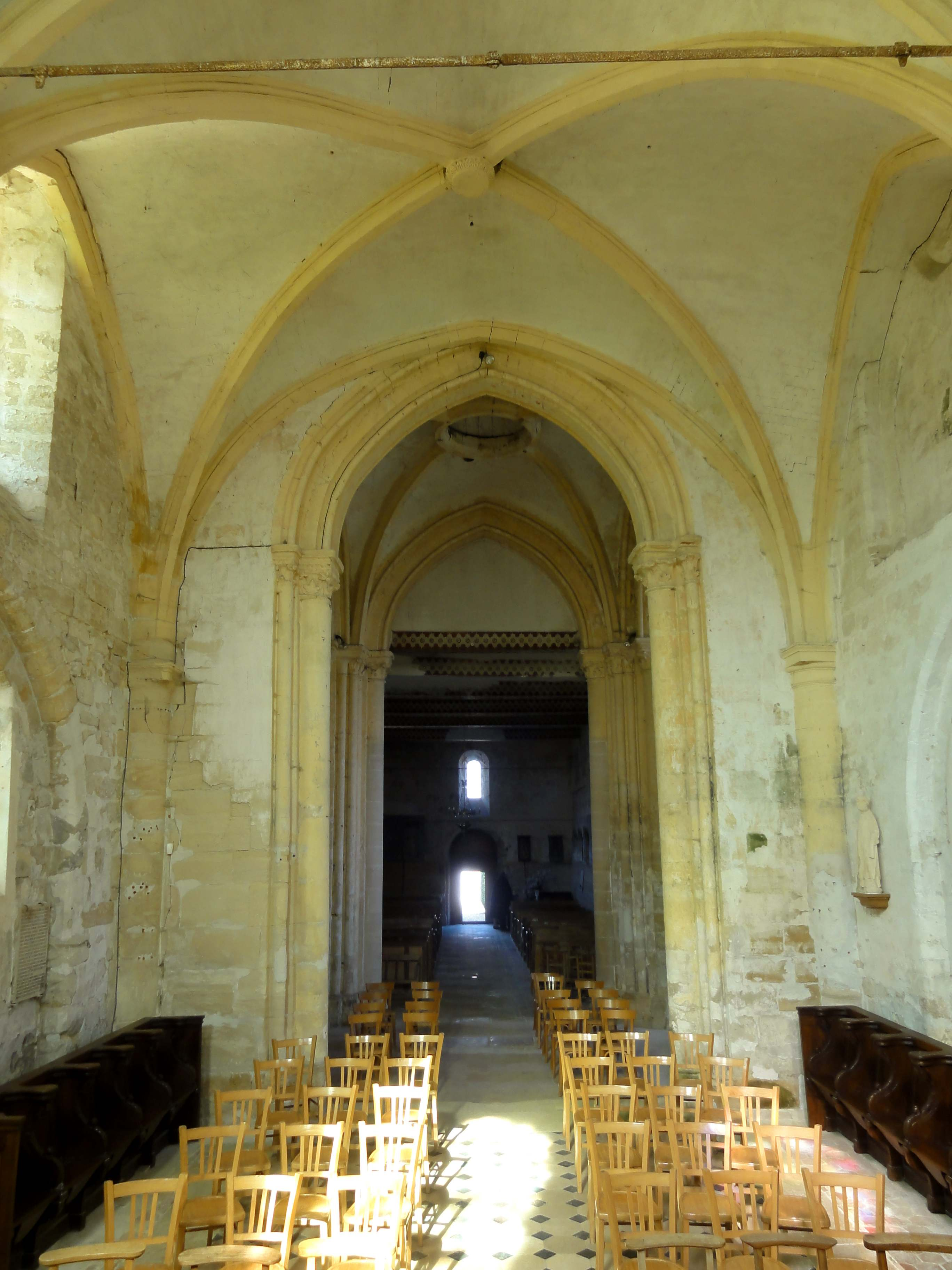 Intérieur de l'église - voir titre.